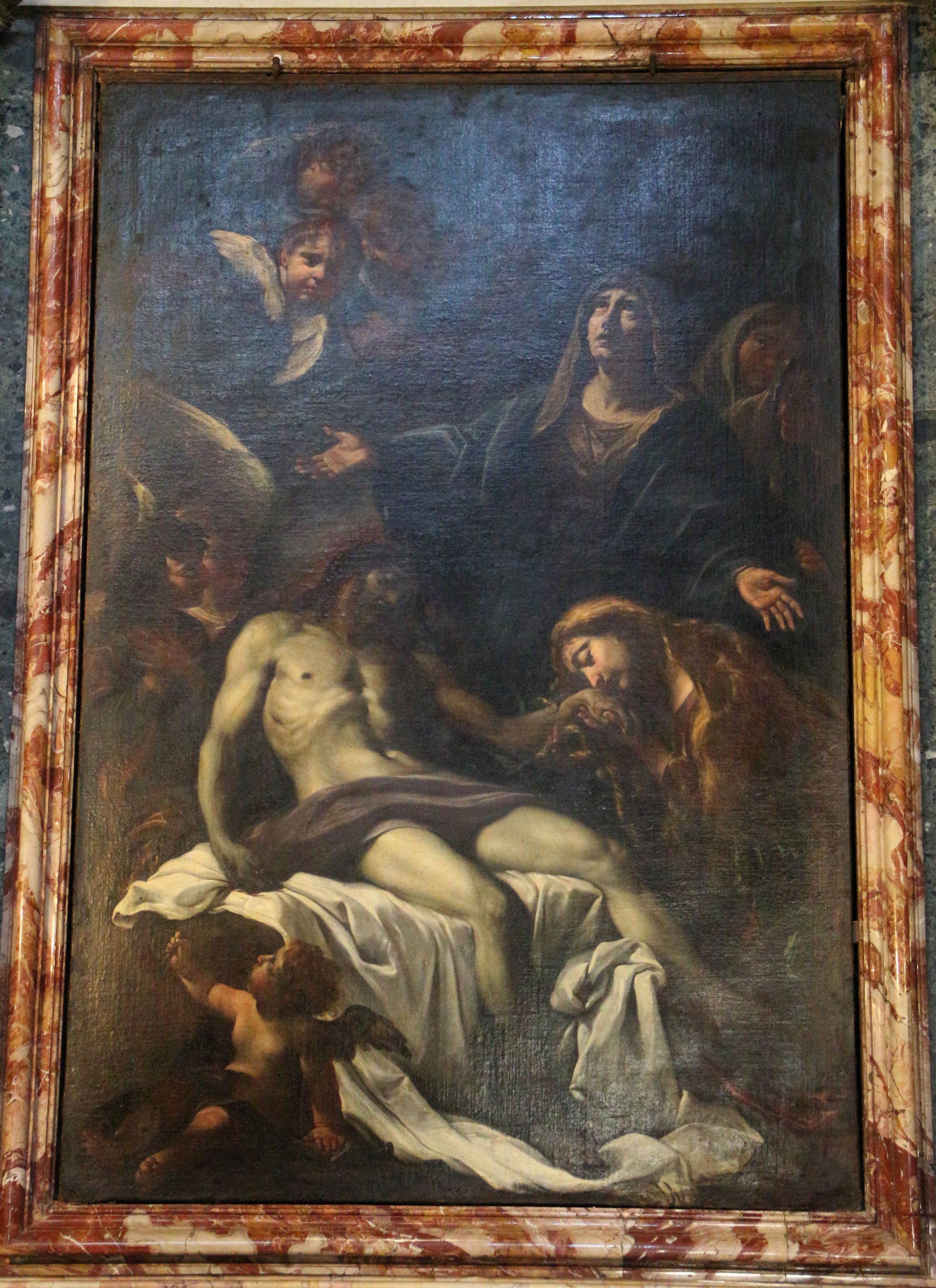 Giacinto brandi, deposizione, 1682, 02.JPG